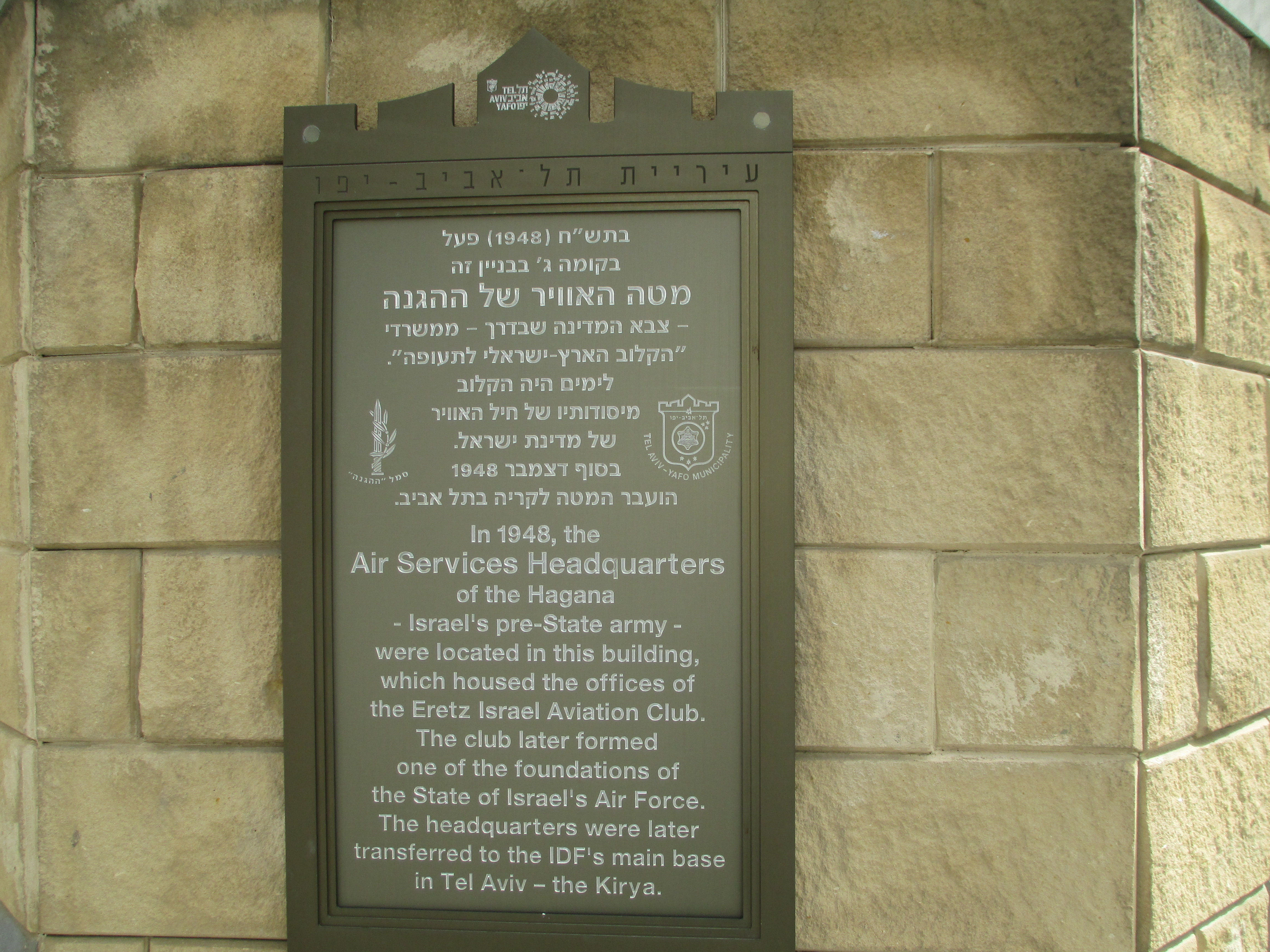 לוחית זיכרון למקומו הראשון של מטה חיל האוויר בקריה.